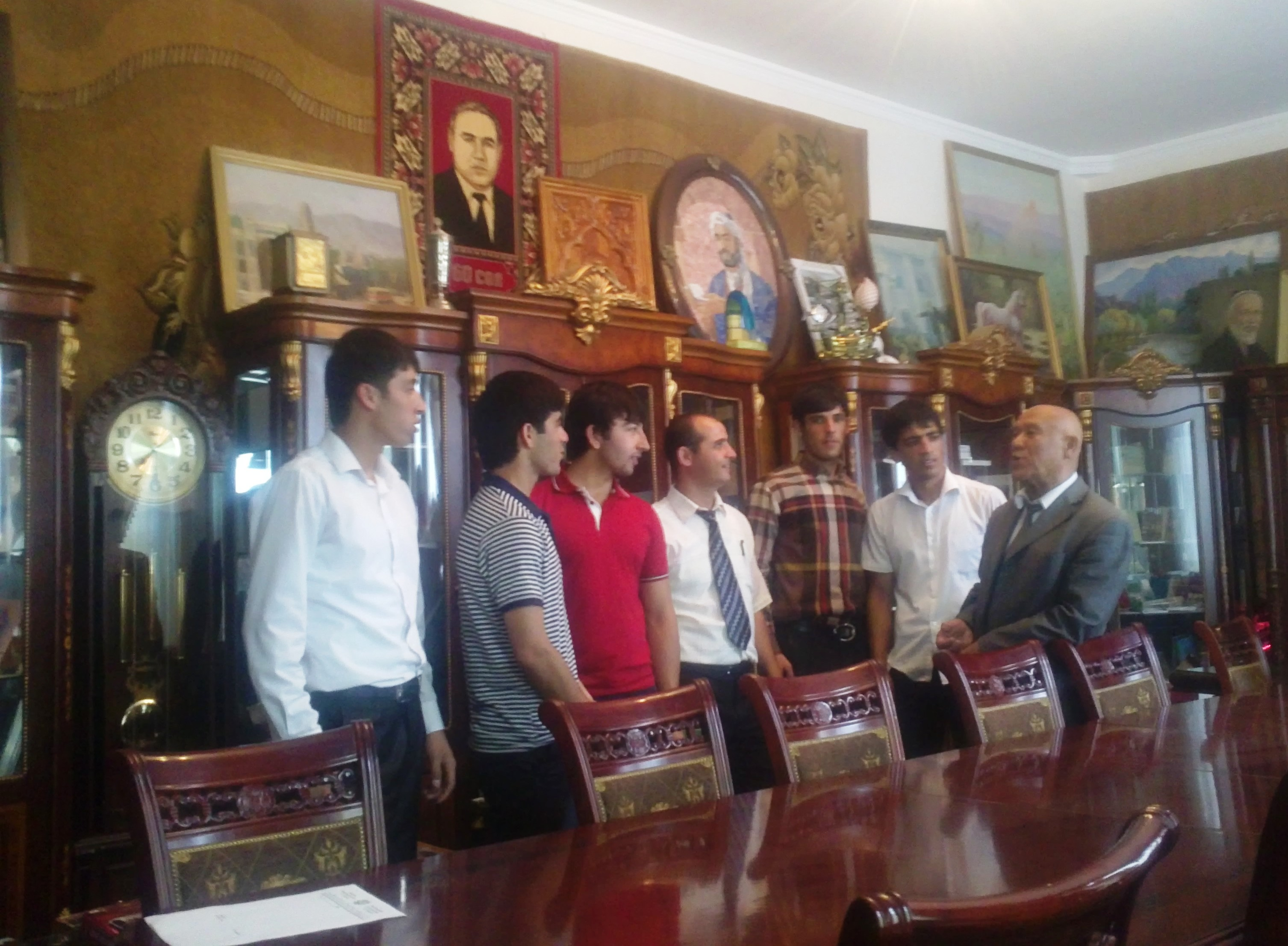 Тоҷикӣ: Экскурсия в музее Б Гафурова, 2013 г.